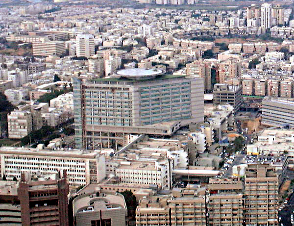 Ichilov Hospital in Tel Aviv, Israel.